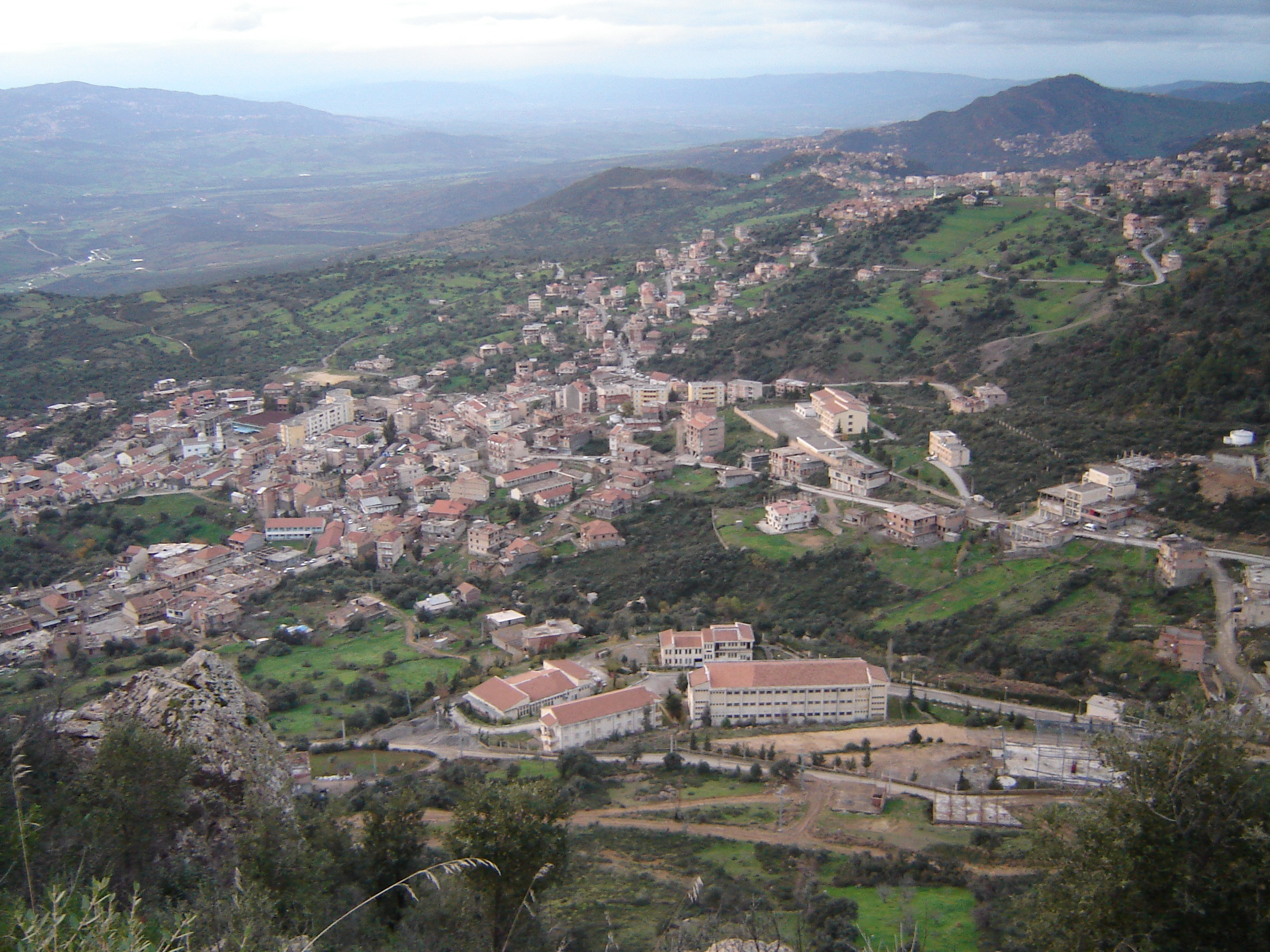 Bouzeguene en Kabylie entouré des principaux villages. Photo prise d'Aït El Karne. Wilaya de Tizi Ouzou, Algérie.